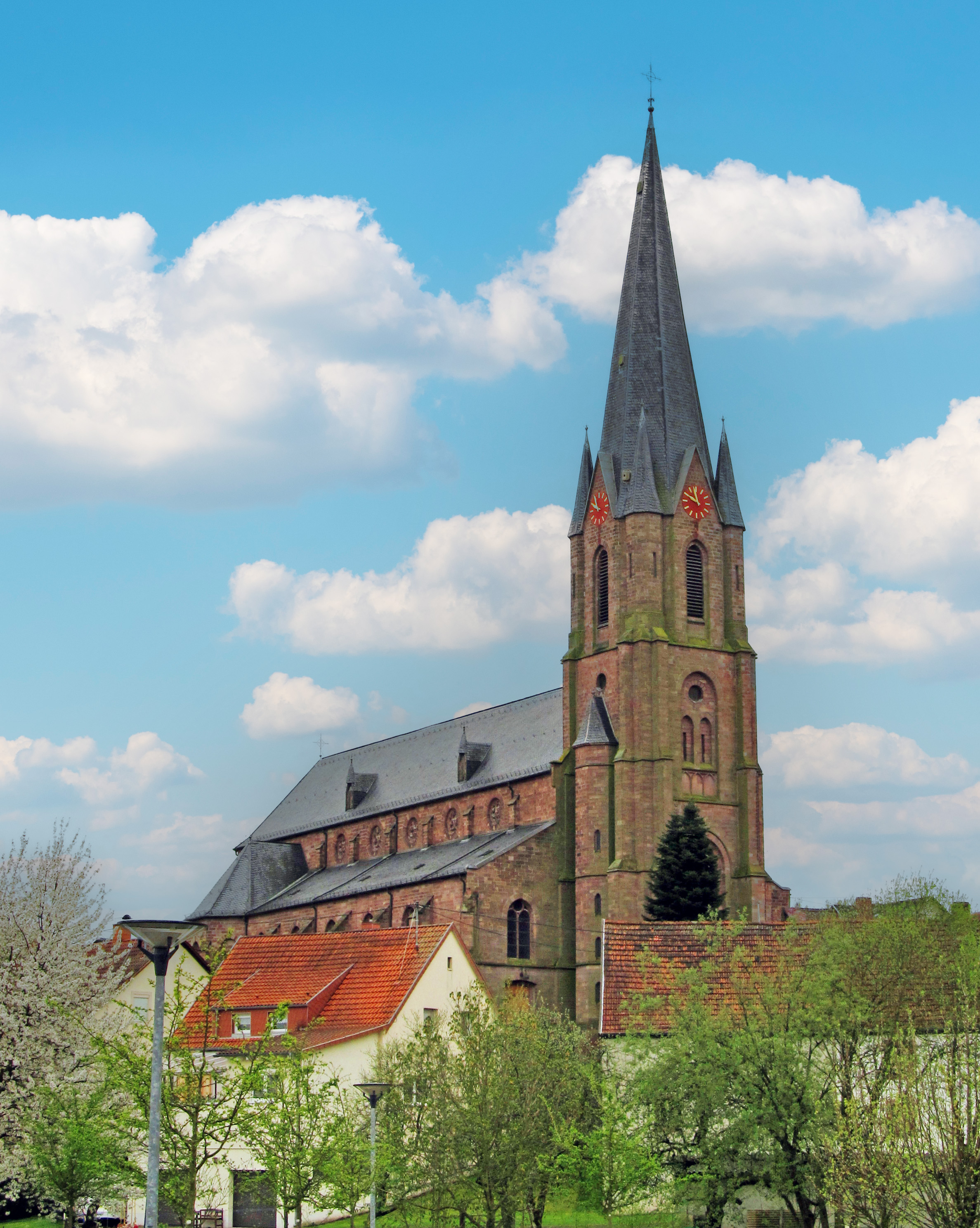 Die katholische Pfarrkirche St. Josef in Uchtelfangen, einem Ortsteil von Illingen, Landkreis Neunkirchen, Saarland